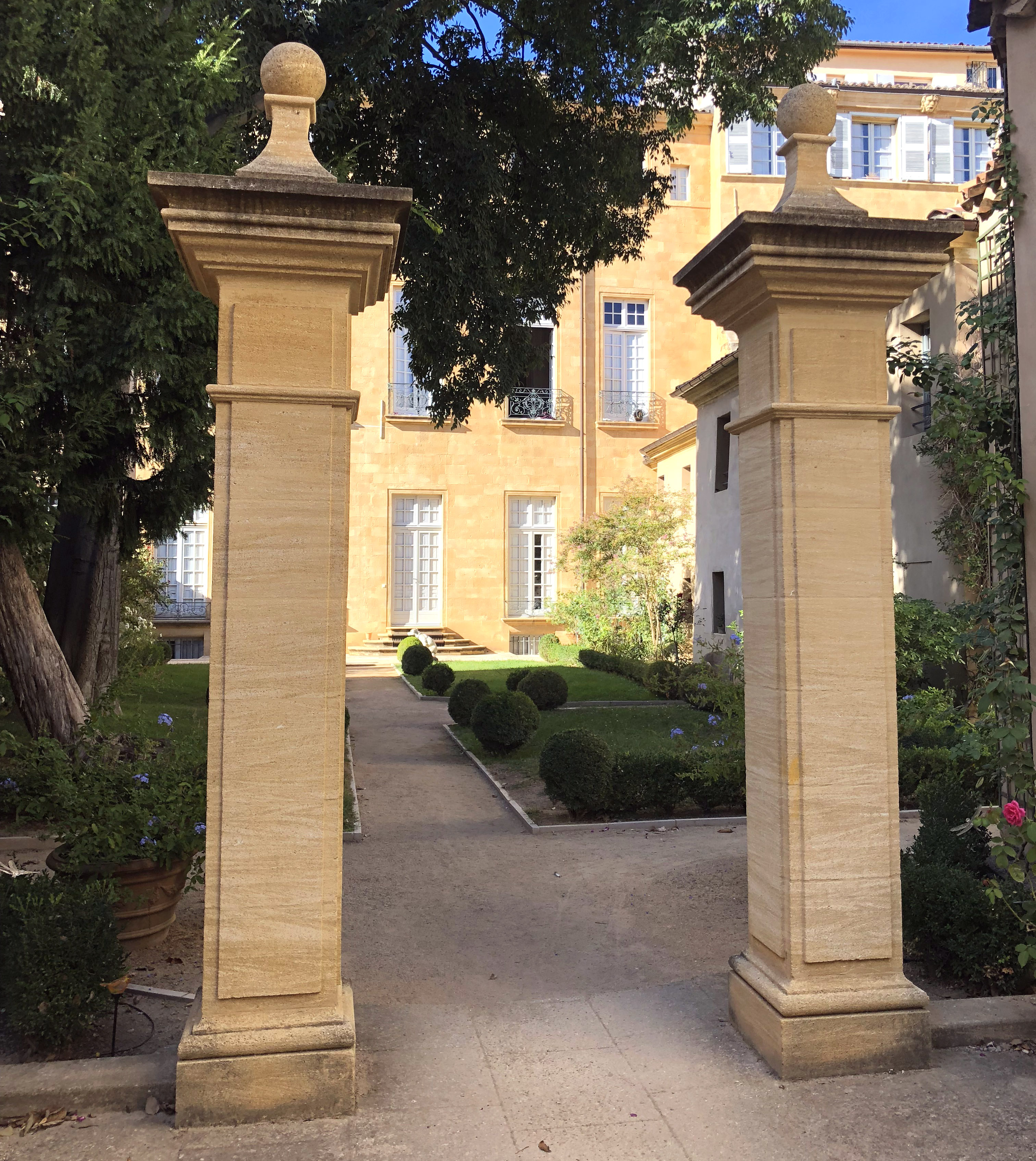 cour interieure de l'hotel Arlatan Llauris